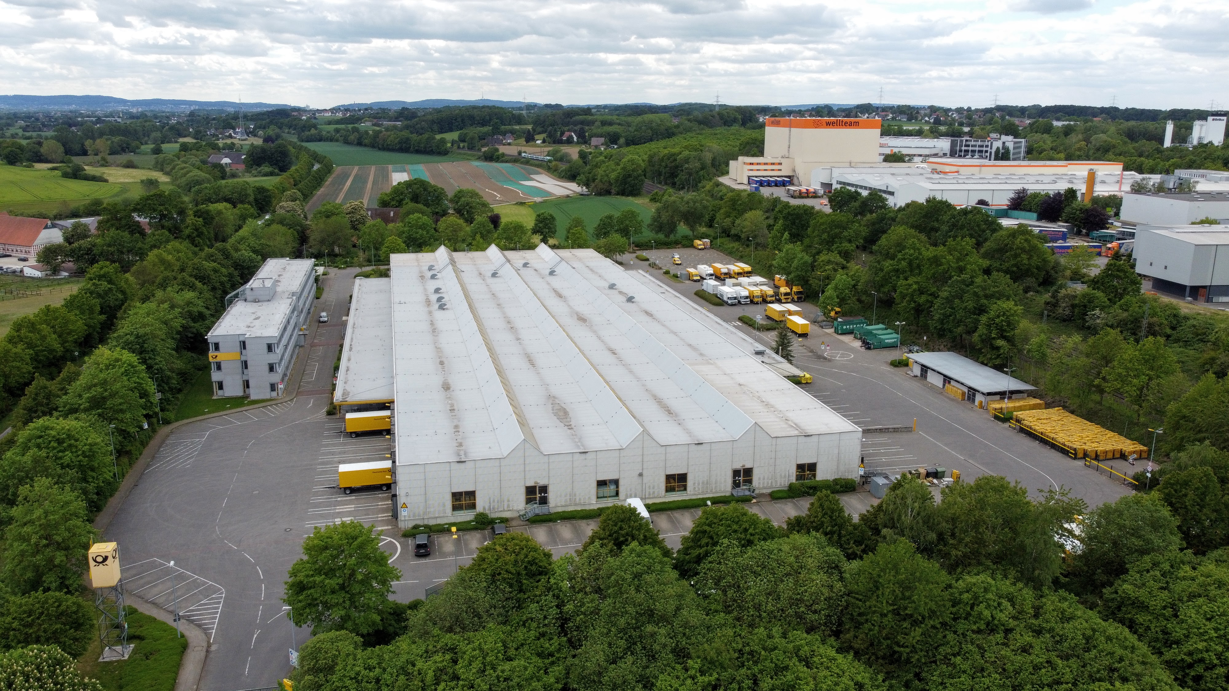 Briefzentrum Herford Luftbild mit Drohne